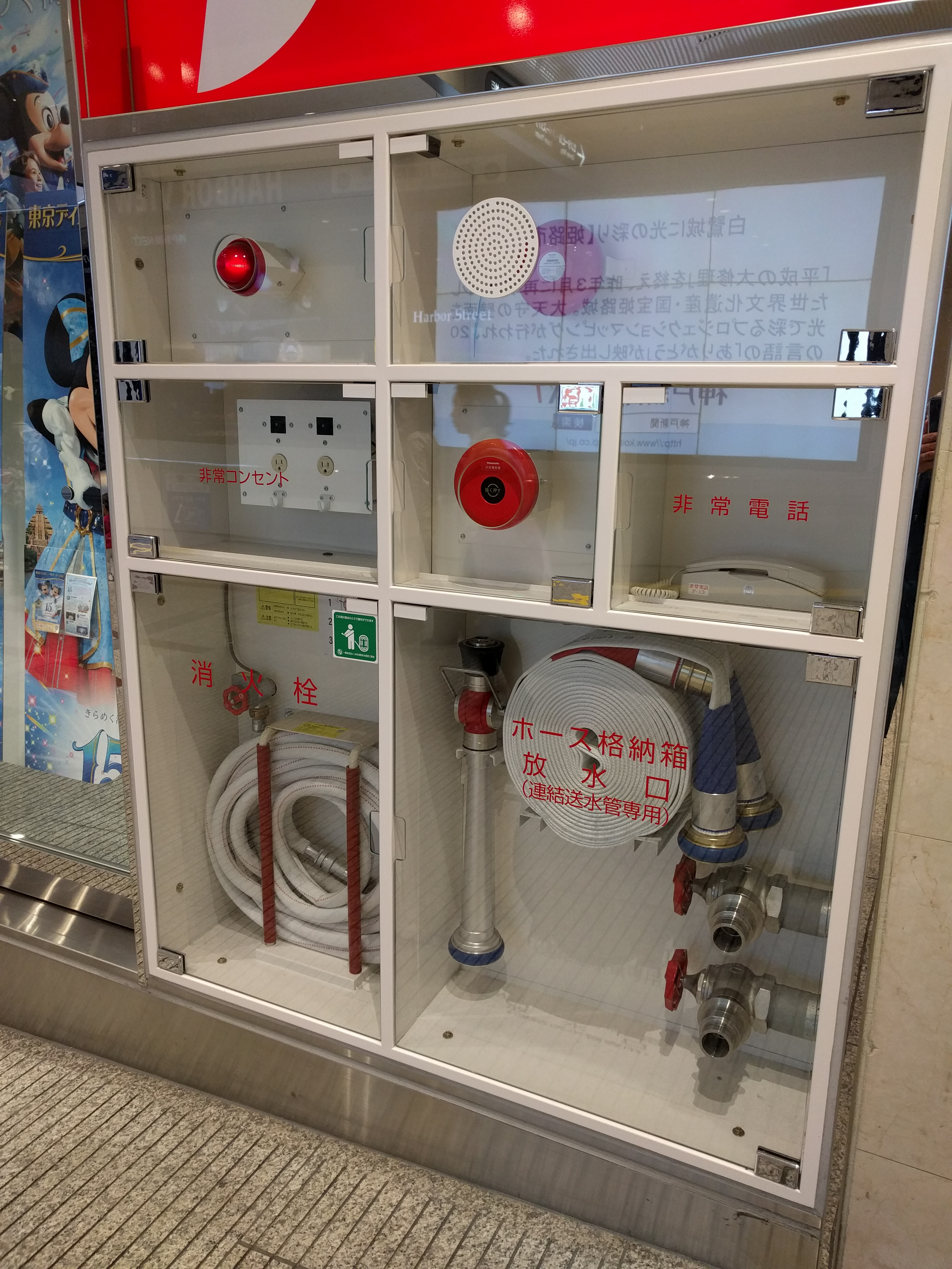 透け透けな消火栓